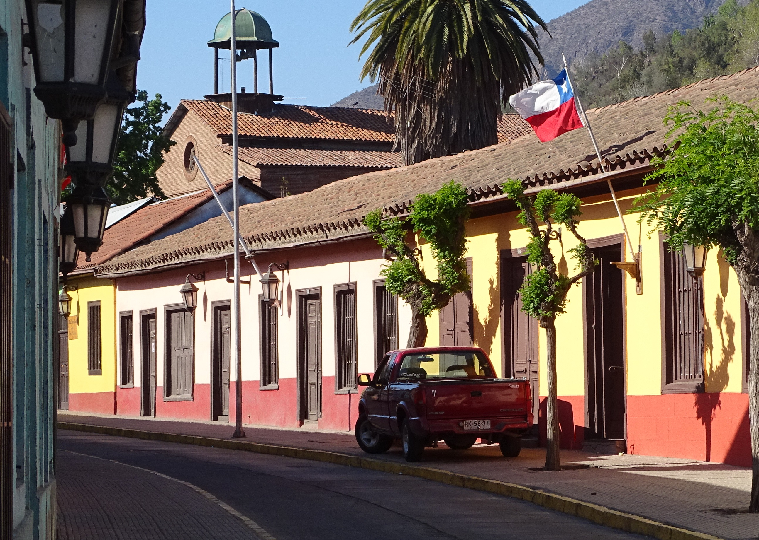 Calle Comercio, principal arteria vial de Putaendo, Región de Valparaíso, Chile, destacada por su arquitectura y patrimonio colonial.